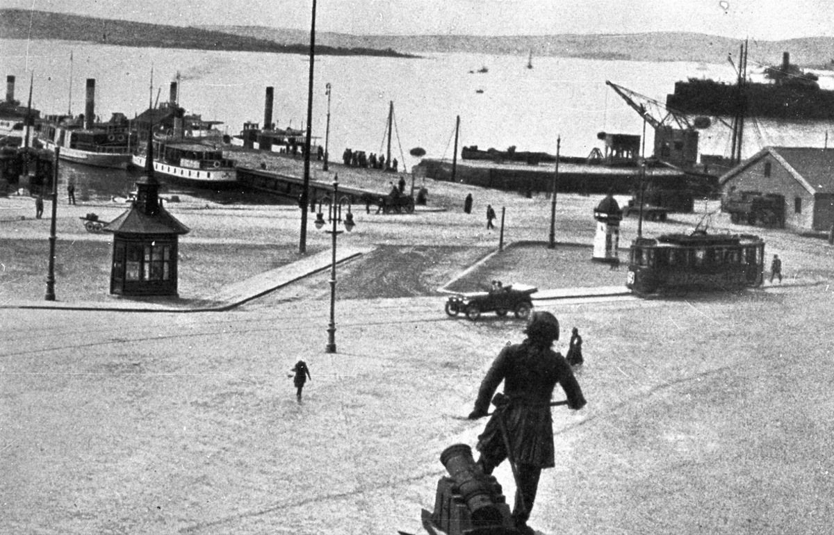 Tordenskiolds plass, ca. 1910